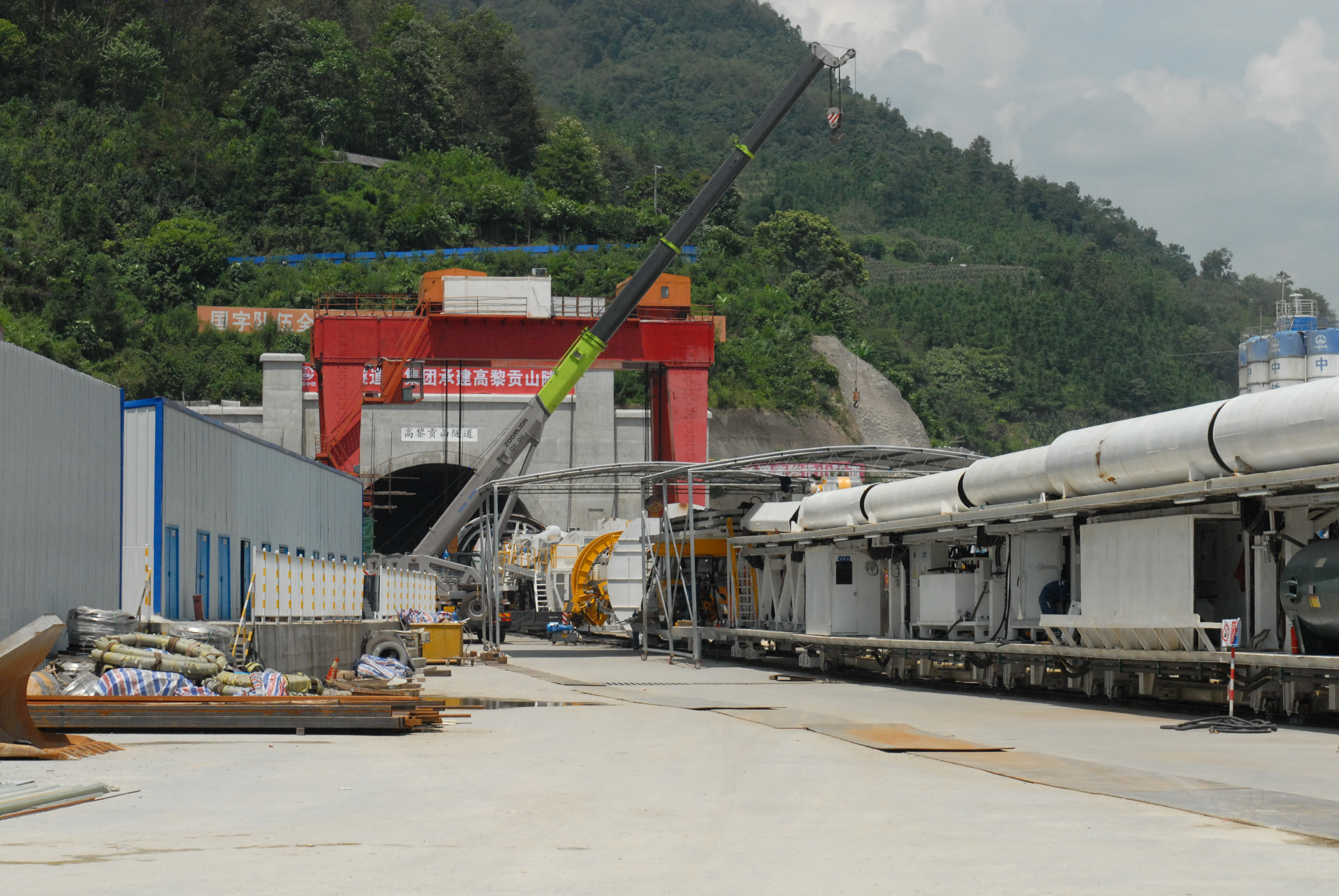 高黎贡山隧道施工现场